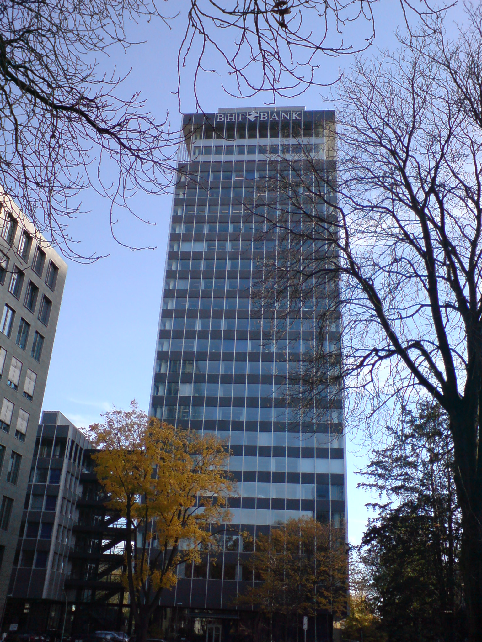 BHF-Bank in Frankfurt am Main